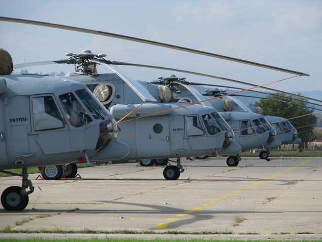 Mil Mi-171 Sh